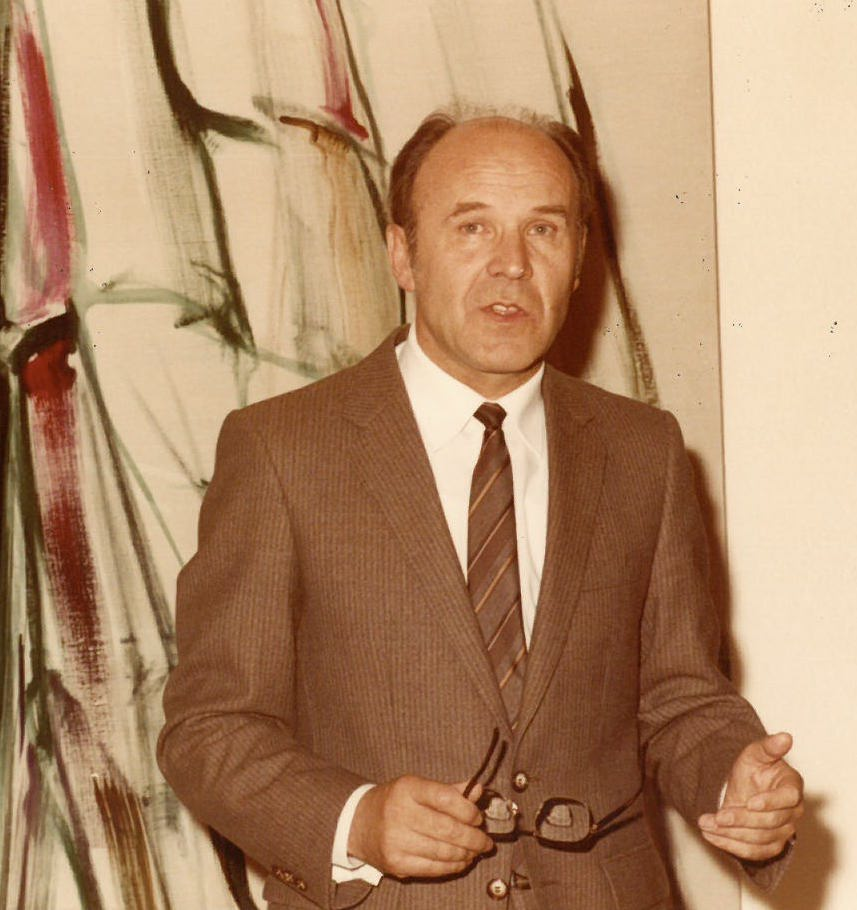 Leopold Ganzer bei Seiner Ausstellung in der Stadt Galerie Lienz